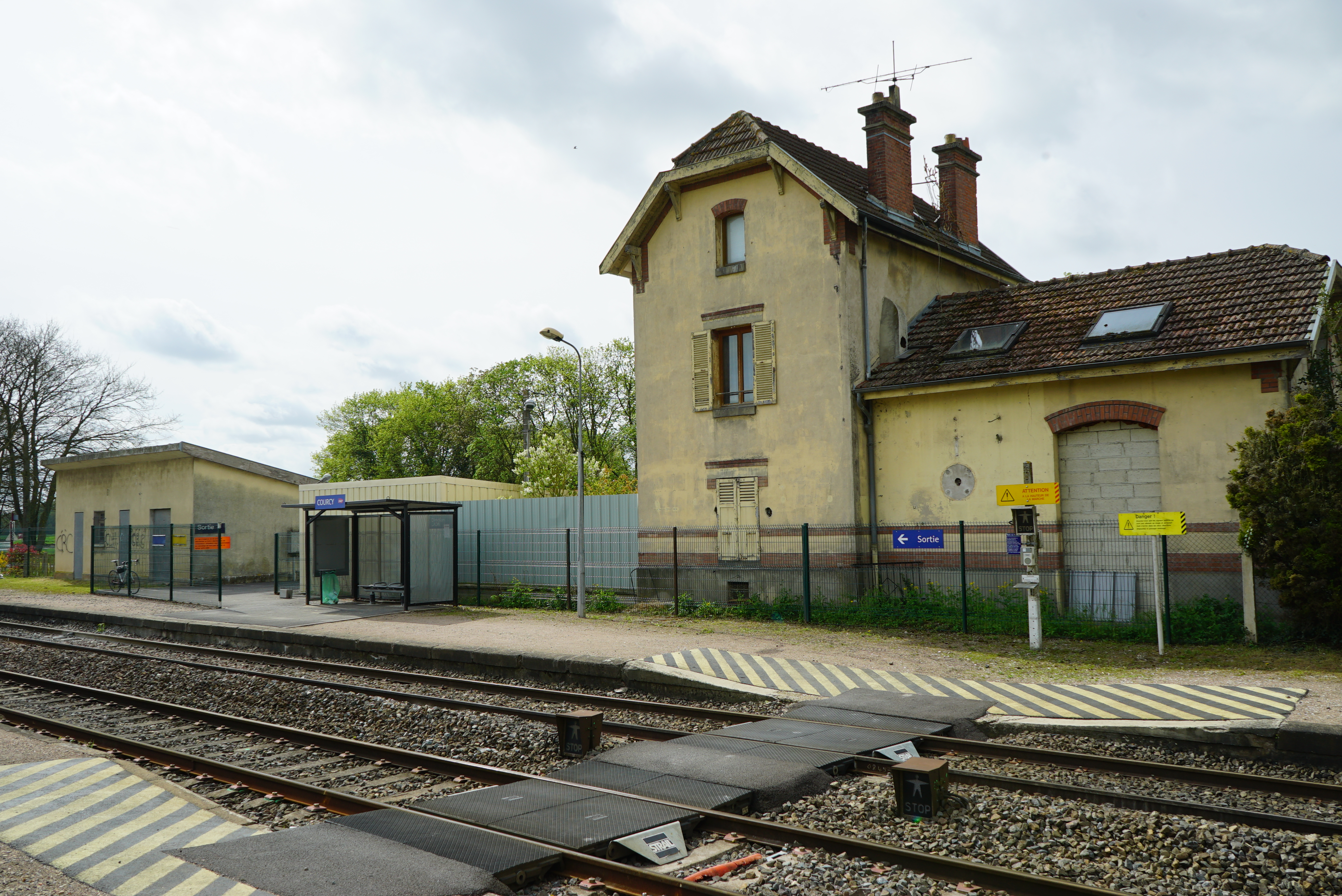 image de la Gare Courcy-Brimont.